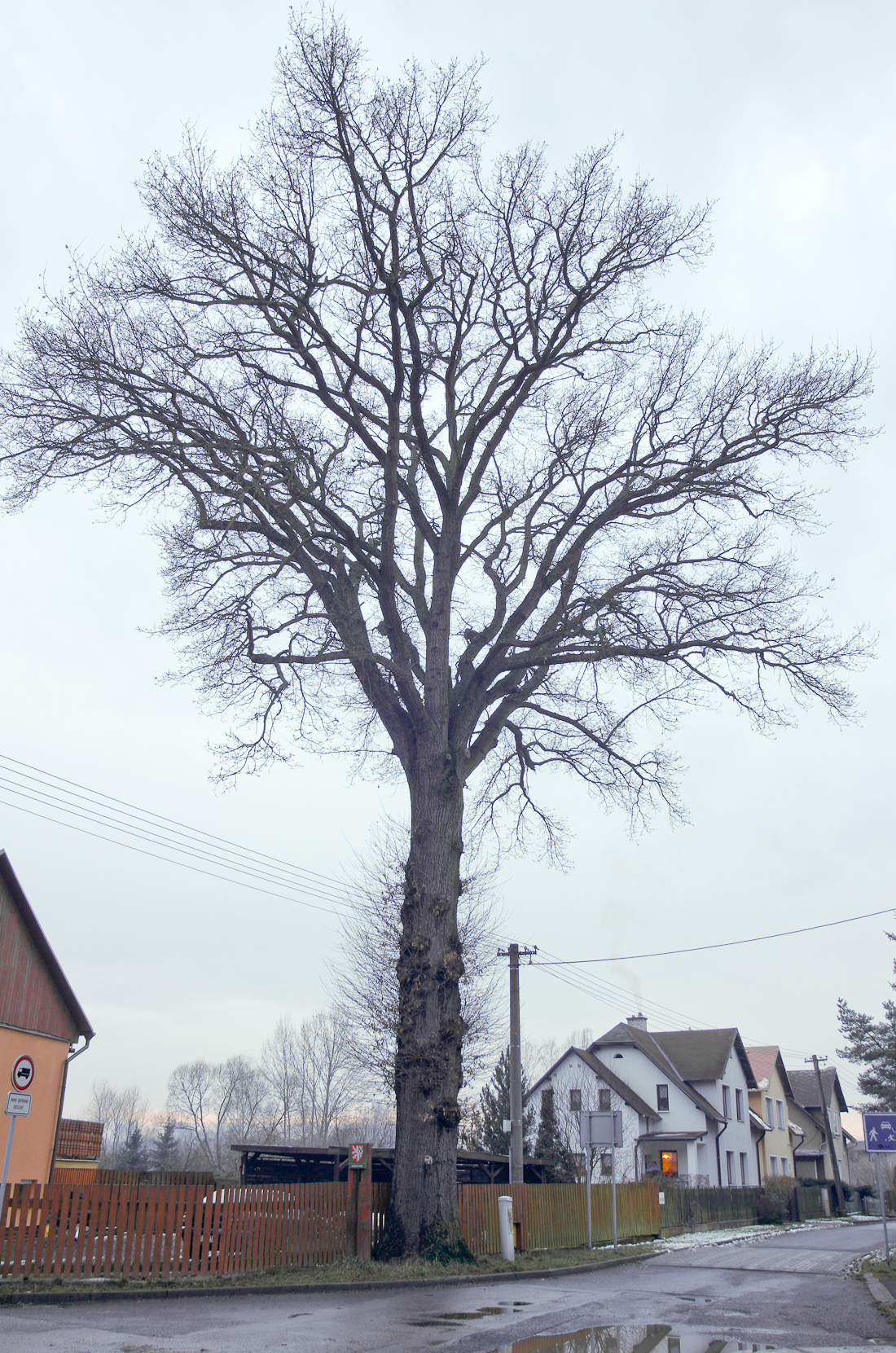 památný strom Dub u hráze, Kynšperk nad Ohří, okres Sokolov